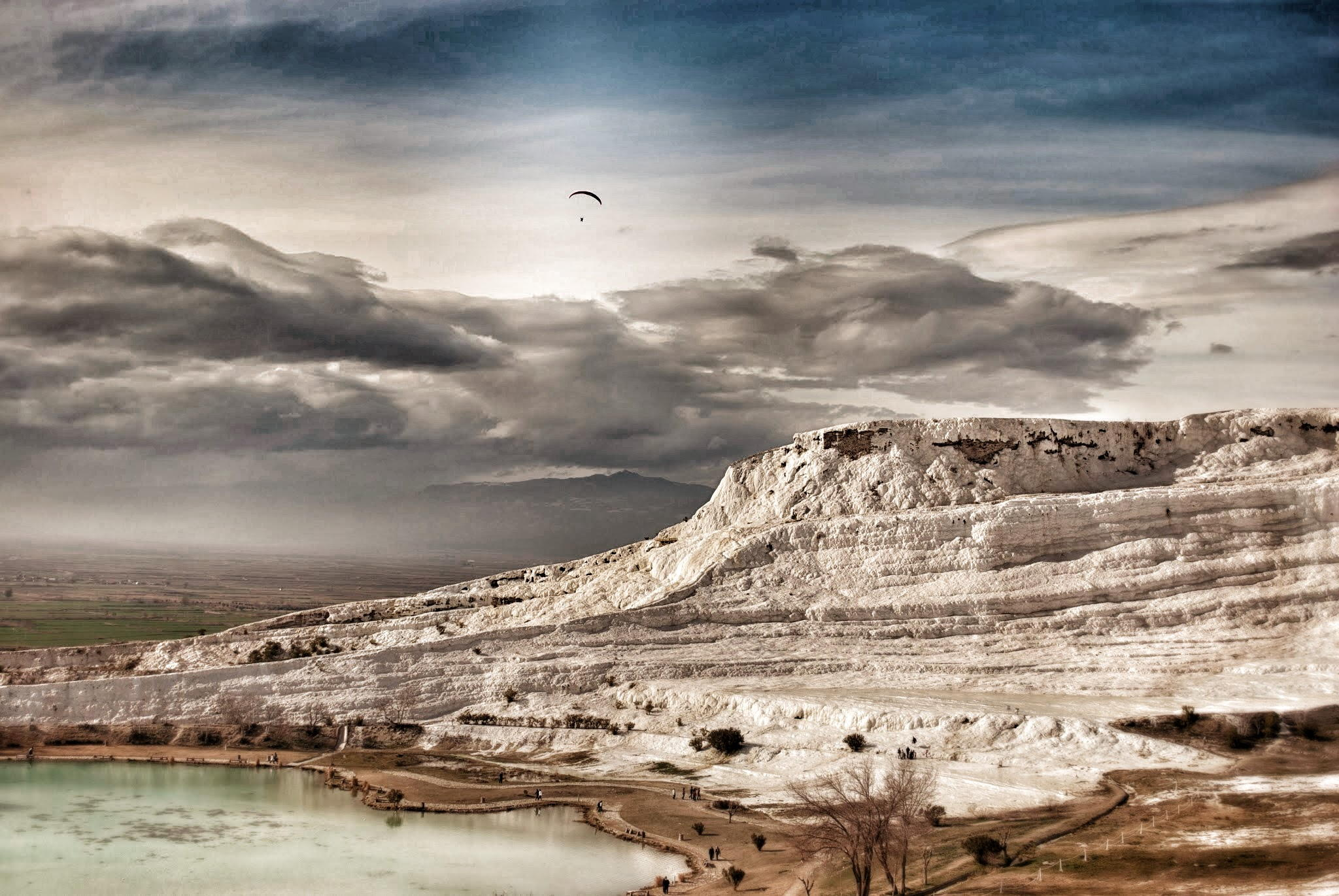 Памуккале